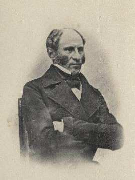 Eestimaa maanõunik ja rüütelkonna peamees Rudolf von Patkul (1800-1856)